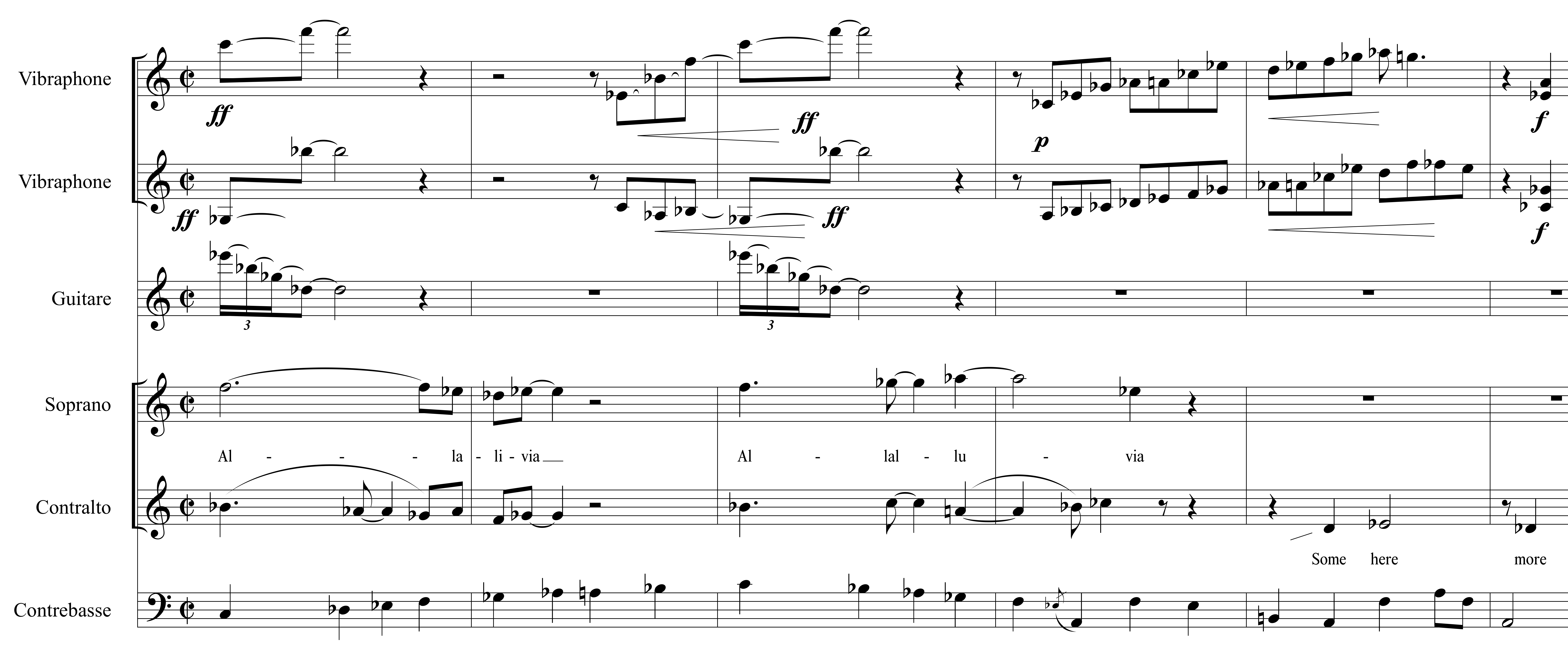 Extrait de la pièce XXIII d'Anna Livia Plurabelle d'André Hodeir